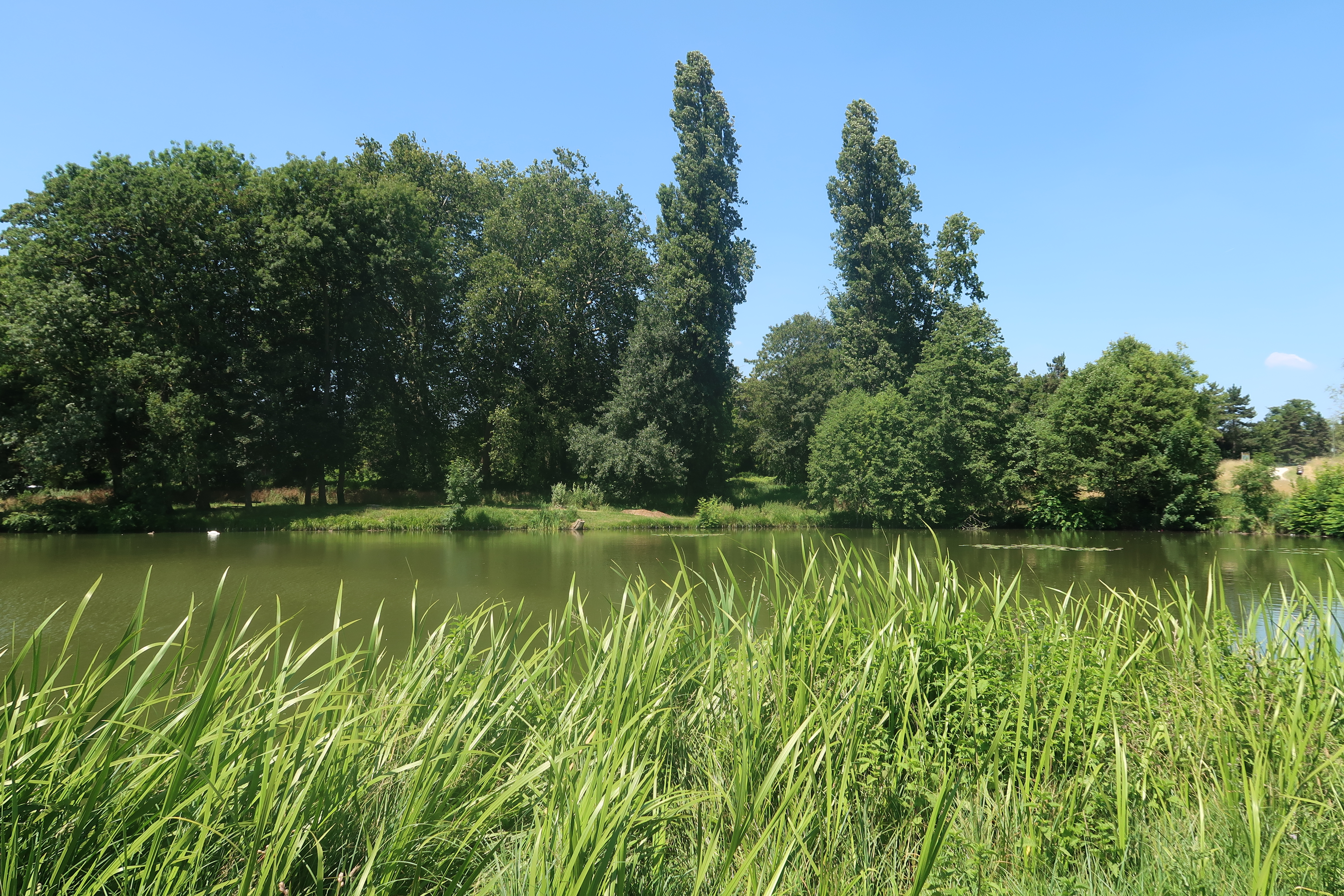 Étang de Suresnes dans le bois de Boulogne (Paris, 16e).